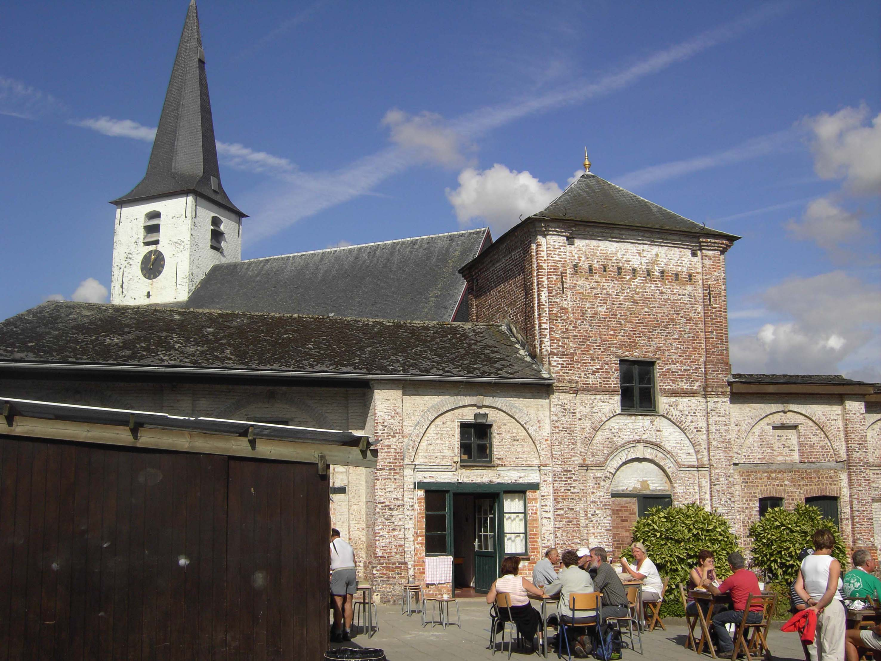 Sint-Kornelis-Horebeke - omgeving kerk - Horebeke